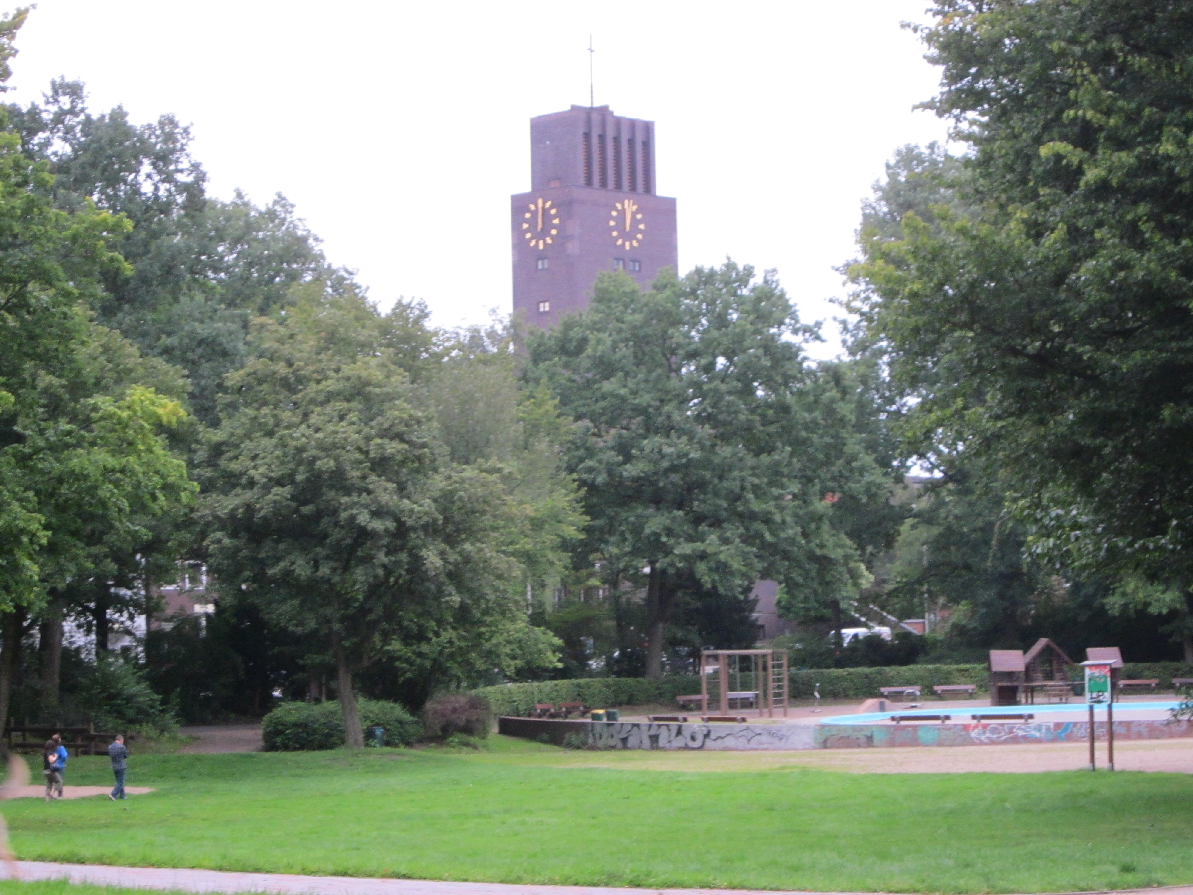 Der Schleidenpark am Biedermannplatz in Barmbek-Süd wurde 1903/04 als Naherholungsgebiet für das neu entstehende Arbeiterviertel geschaffen. Die dahinter stehende Bugenhagenkirche wurde 1927-29 nach Plänen von Emil Heynen errichtet. This is a photograph of an architectural monument.